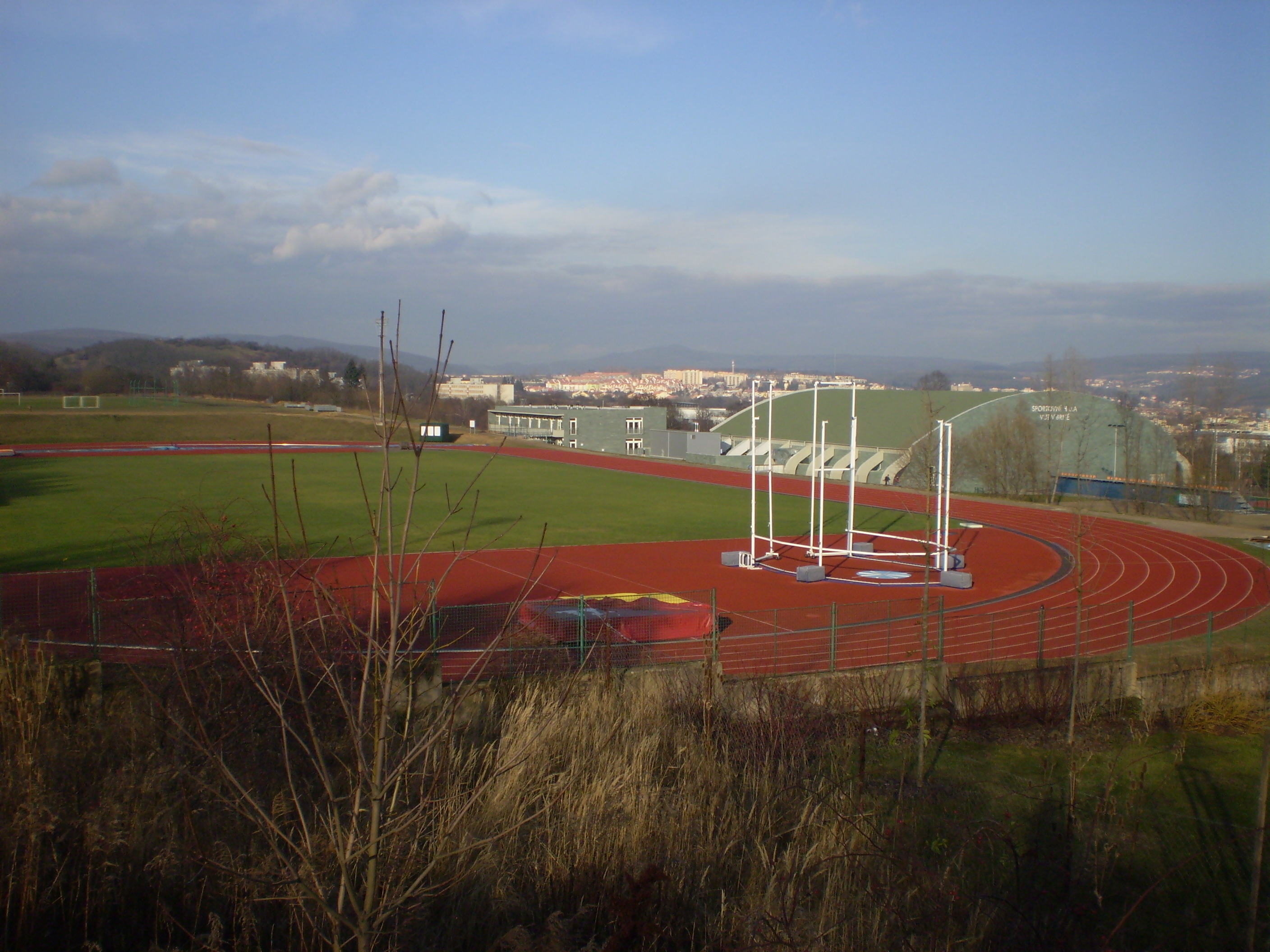 Hřiště a sportovní hala VUT v Brně-Králově Poli.